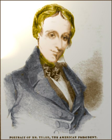 Presidente Tyler in 1843